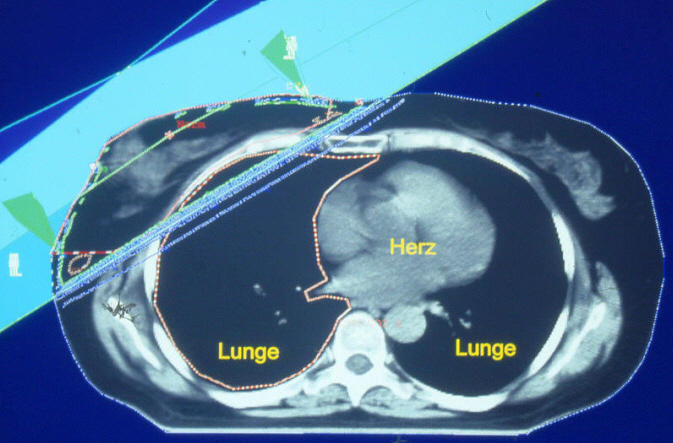 Bestrahlungsplan auf einer Computertomographie-Schichtaufnahme, bei Brustkrebs rechts